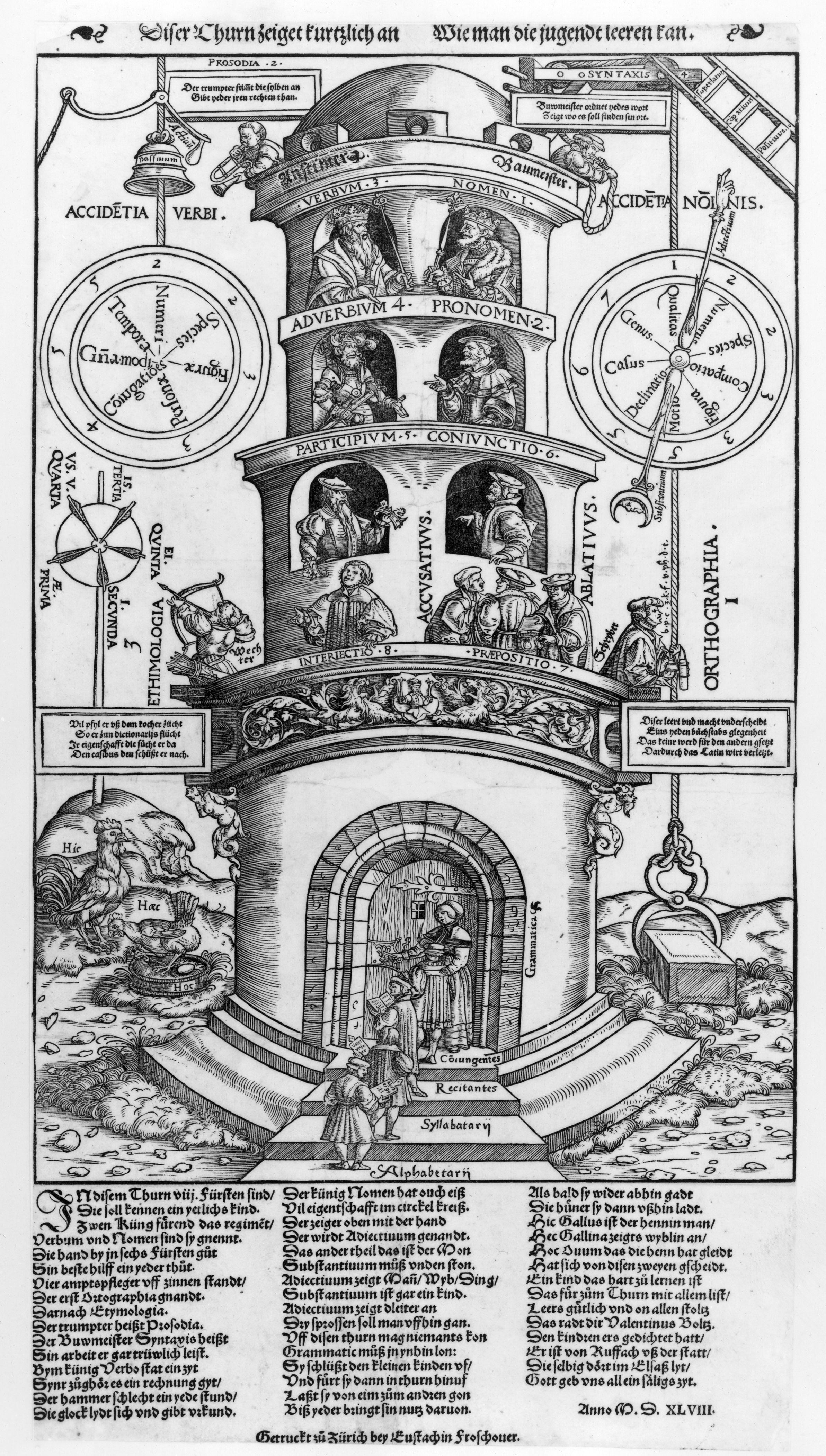 Heinrich Vogtherr der Ältere: Turm der Grammatik, Holzschnitt, 46 x 24 cm, Zürich, gedruckt bei Eustachius Froschauer)